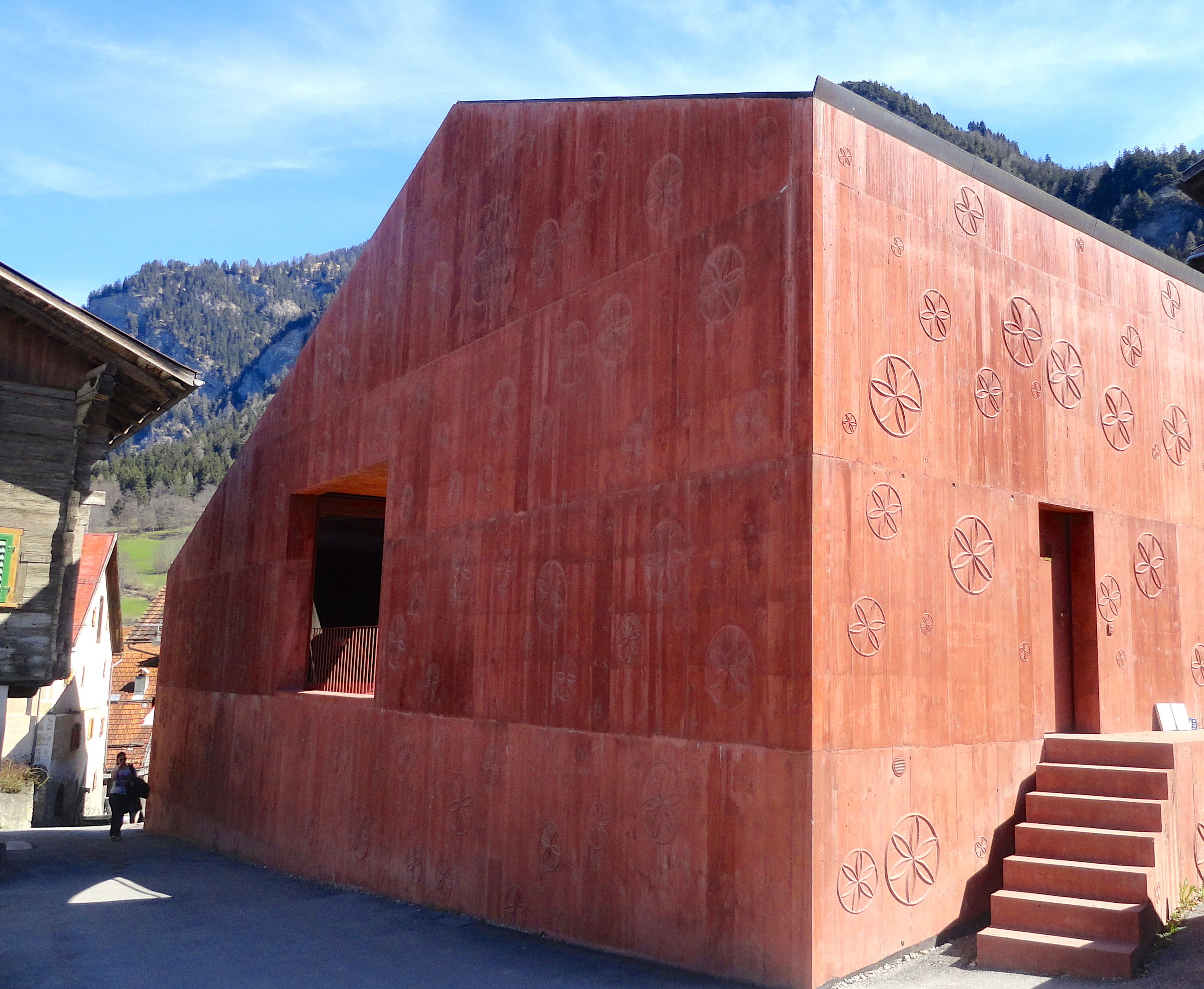 Haus Bardilli, Scharans